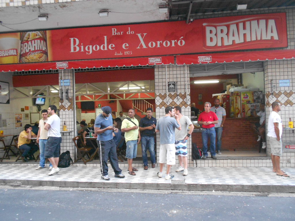 Bar do Bigode e Xororó, situado na Rua Chanceler Oswaldo Aranha, em São Mateus, Juiz de Fora, Minas Gerais, Brasil.